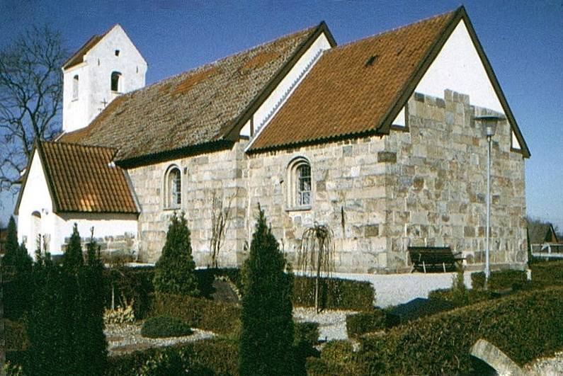 Balle Kirke (Silkeborg Kommune)